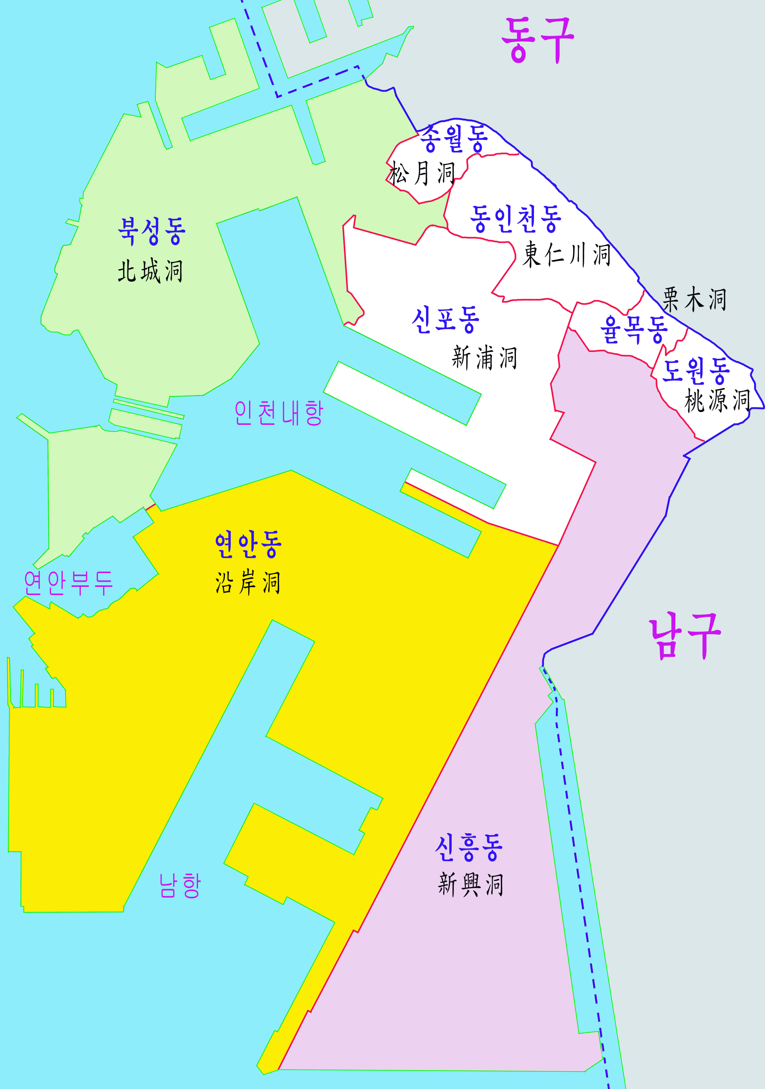 인천 중구 내륙지도